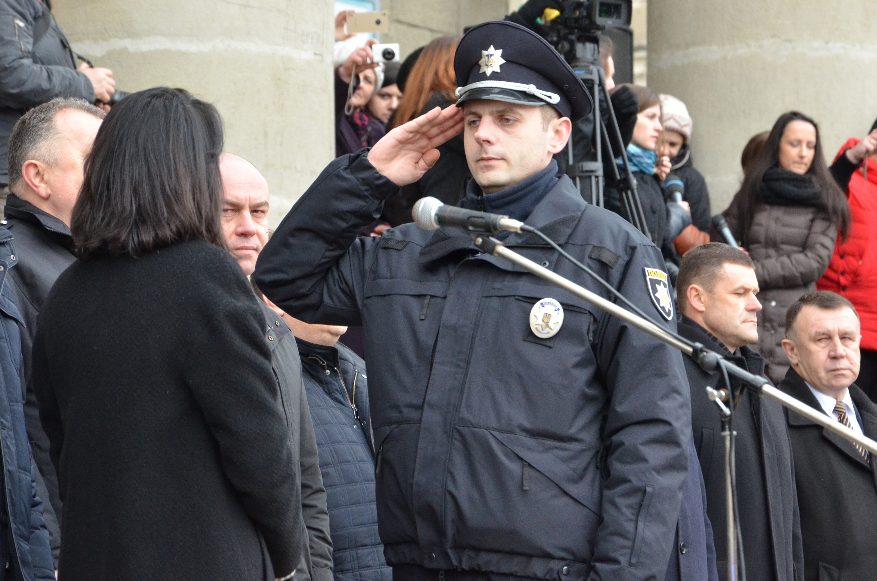 Начальник управління патрульної поліції Тернополя Володимир Струк рапортує Хатії Деканоідзе під час присяги поліціянтів у Тернополі.